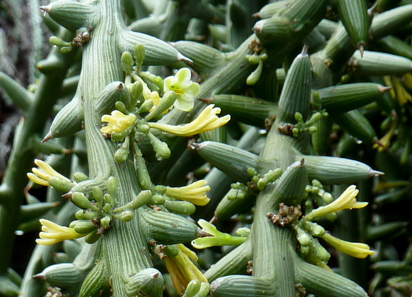 Adenia globosa at Kapiolani Community College Cactus Garden Passifloraceae